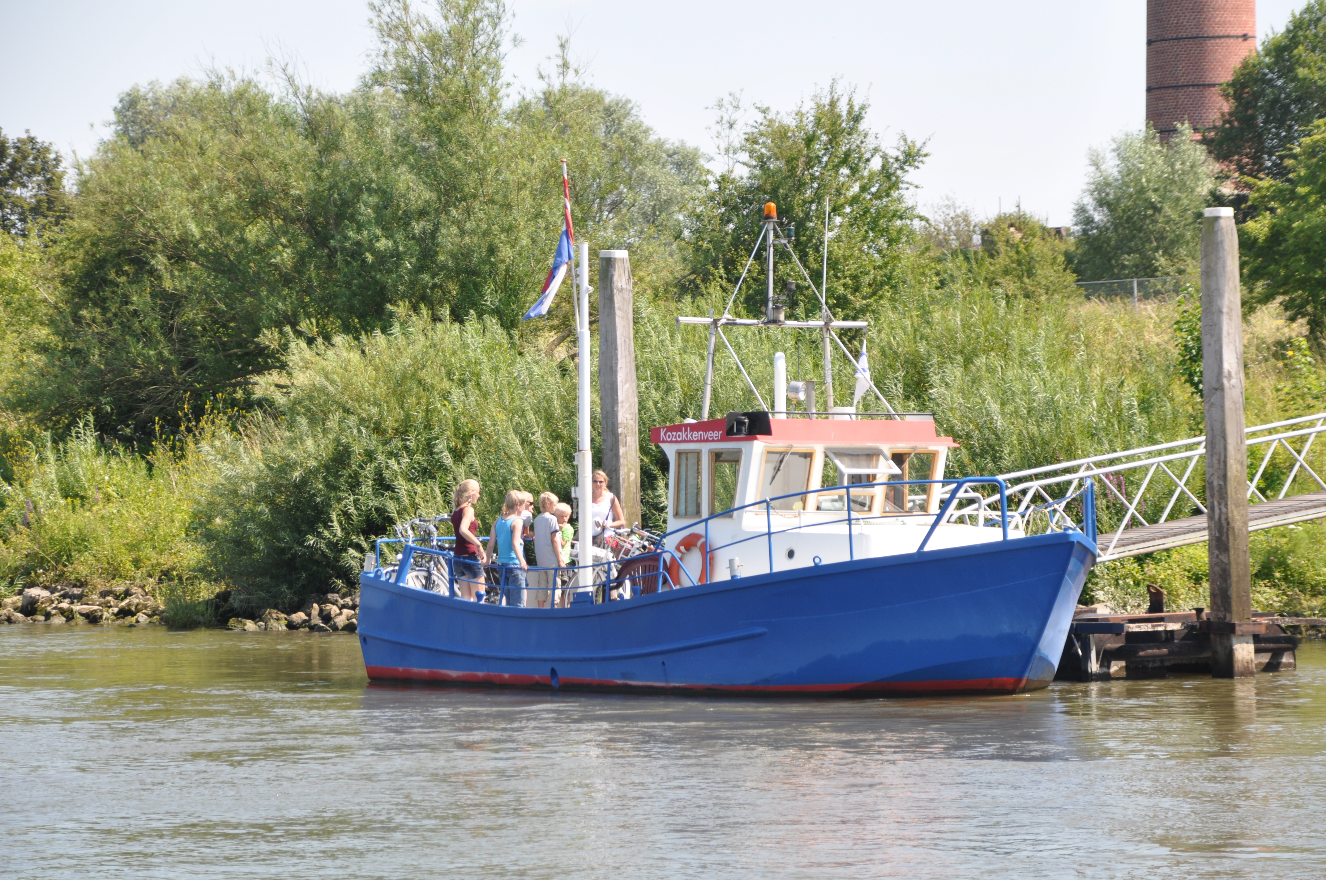 Het KOZAKKENVEER tussen Veessen en Fortmond